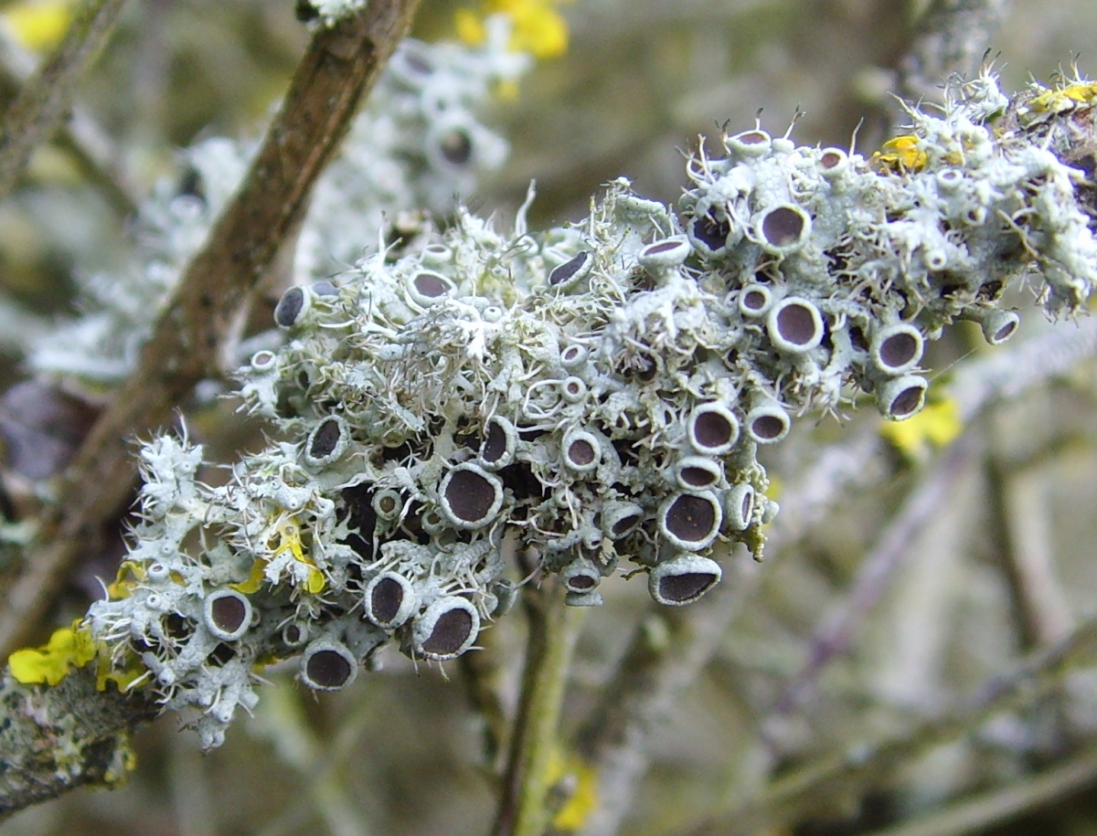 Physcia leptalea, Île aux Vaches, Esquibien, Finistère, Bretagne, France